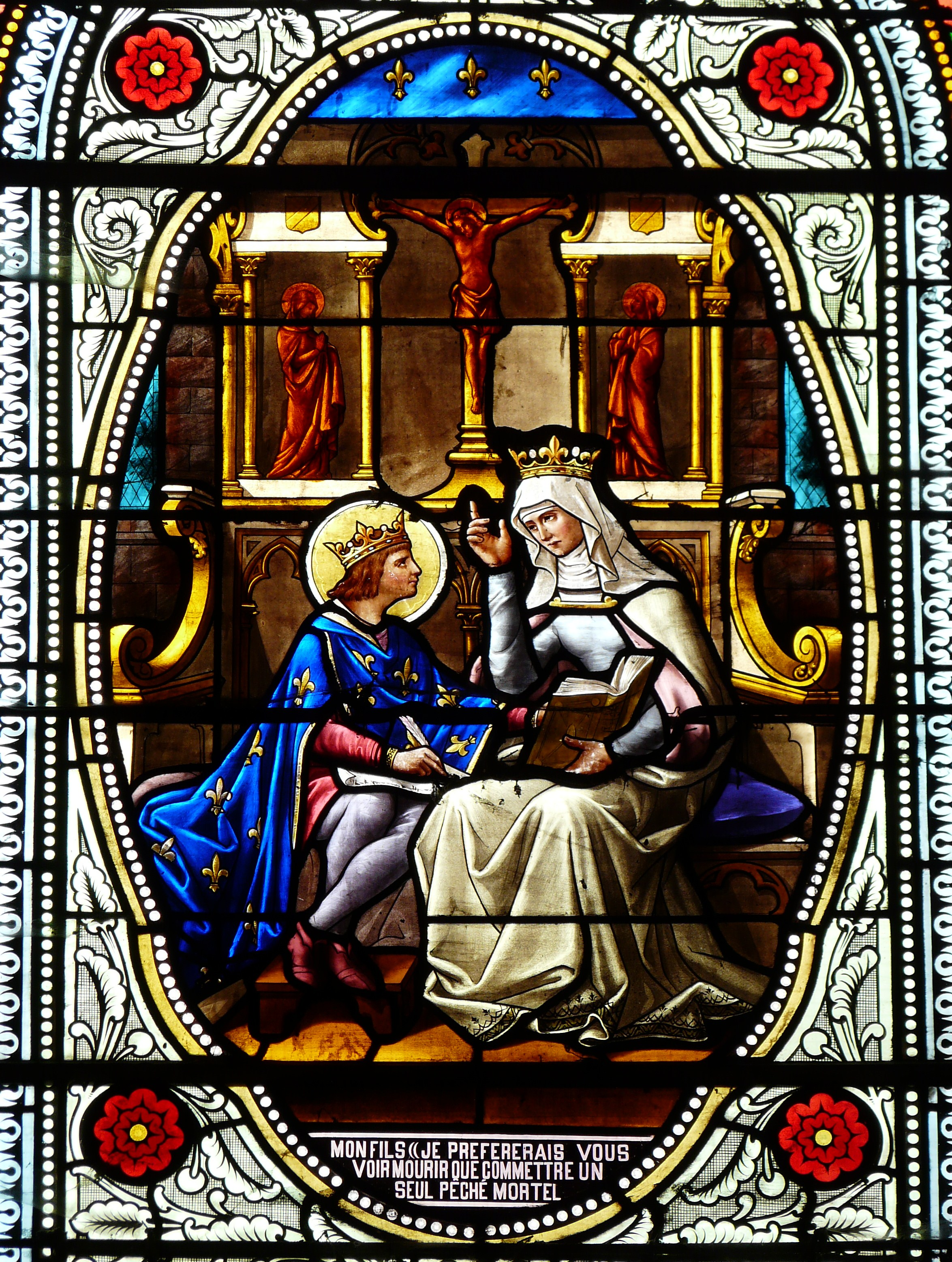 Œuvre de Gustave Pierre Dagrant datée de 1896 : représentations de saint Louis et sa mère, Blanche de Castille : détail d'un vitrail de la nef de l'église Saint-Louis de Saint-Louis-en-l'Isle, Dordogne, France.